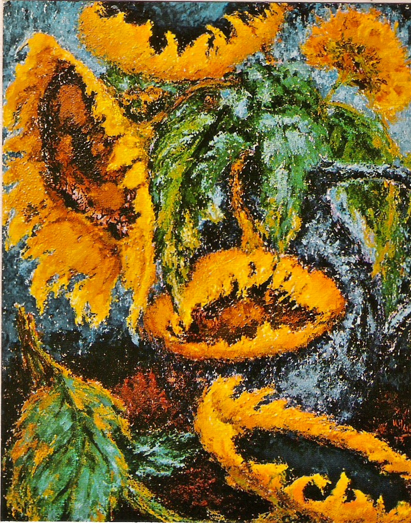 Maler: Karl-Heinrich Kluge